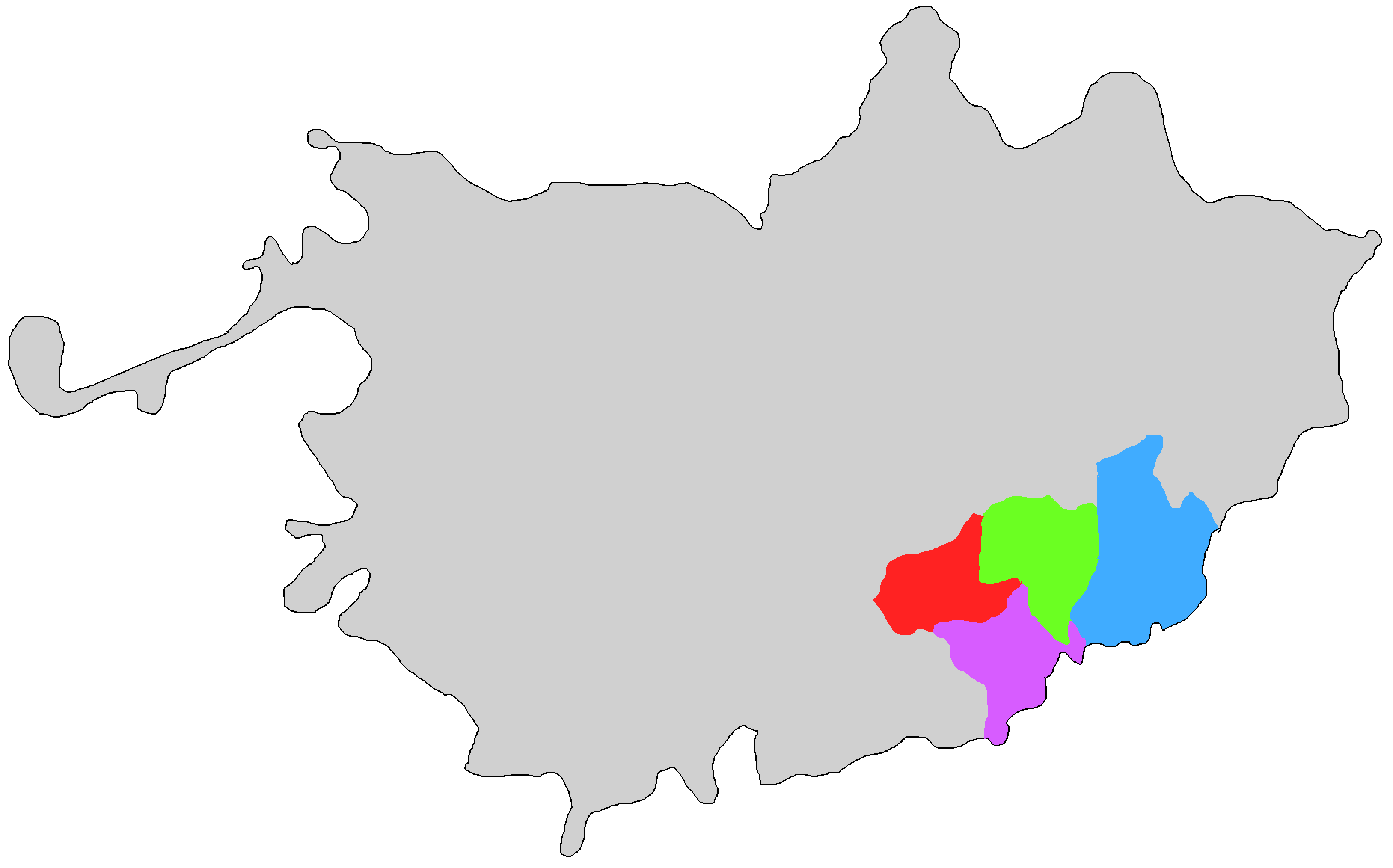 清朝时期今东平州东南部的三个保。 兴仁保 安里仁保 福仁保 仁风孝保